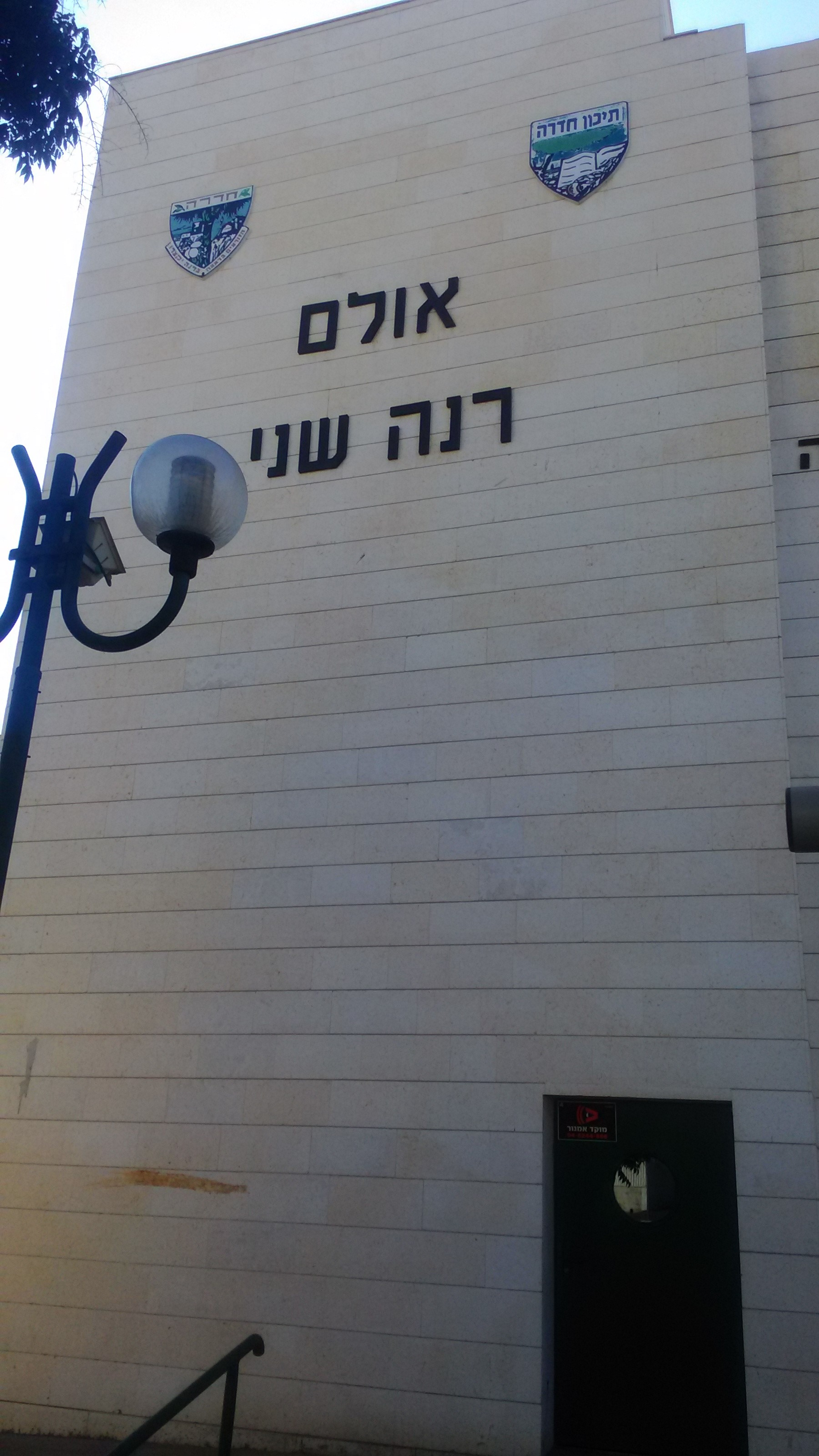 אולם על שם רנה שני בחדרה